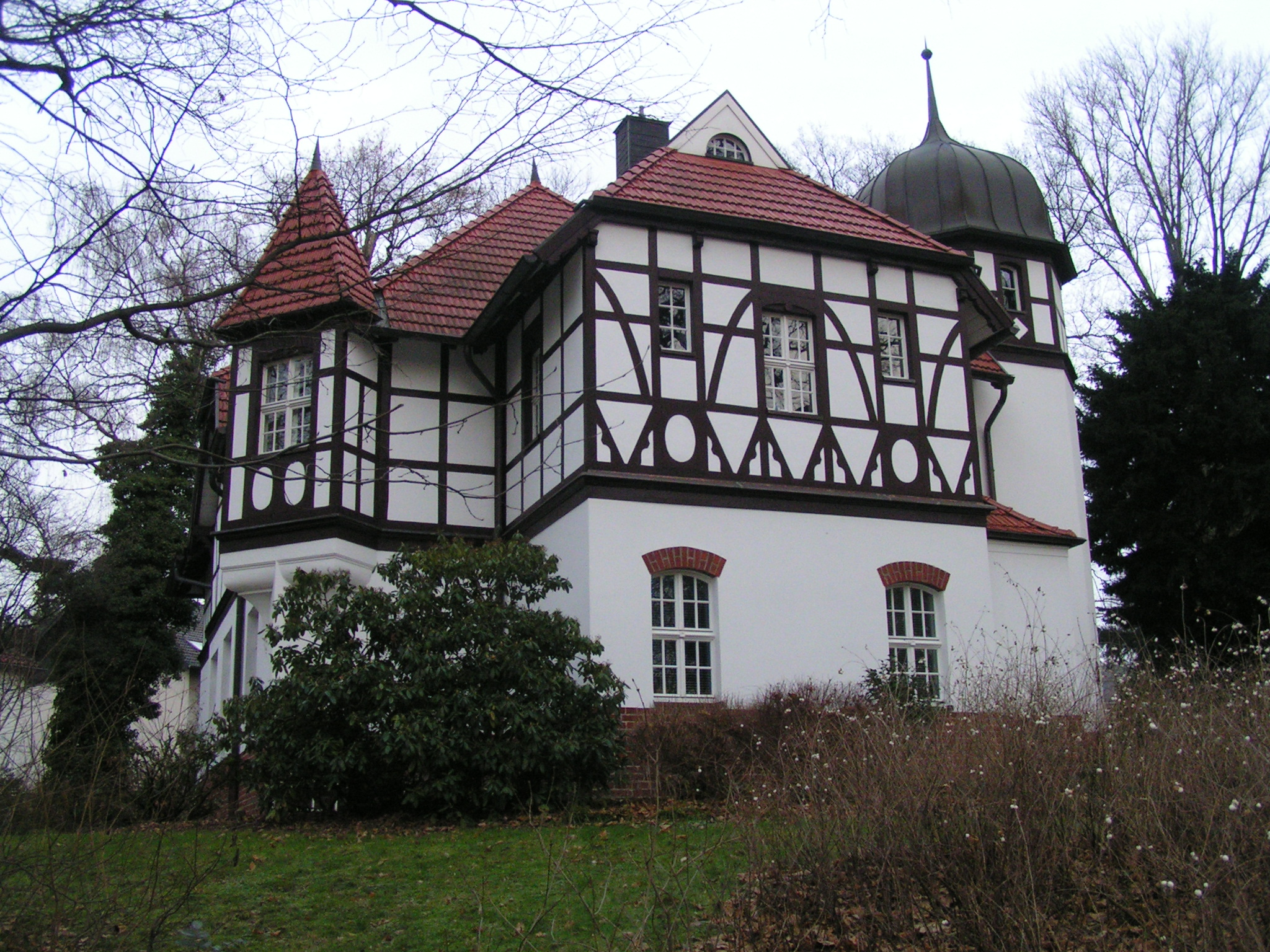 "Kutscherhaus" auf dem Gelände der "Villa Römer" in Leverkusen-Opladen.